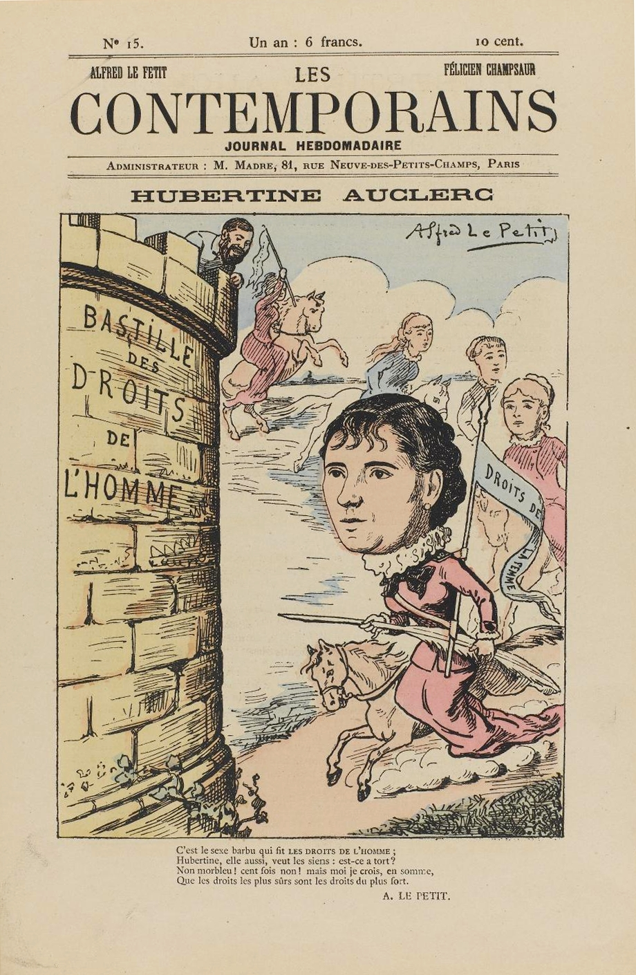 Les Contemporains, hebdomadire n°15, 1881. Hubertine Auclert (1848-1914). Dessin d'Alfred Le Petit. Bibliothèque Marguerite Durand : cote Icono 337